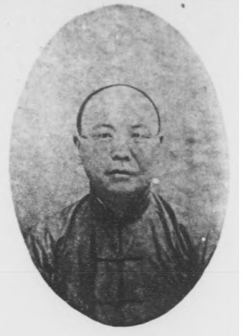 光緒甲辰科進士小像